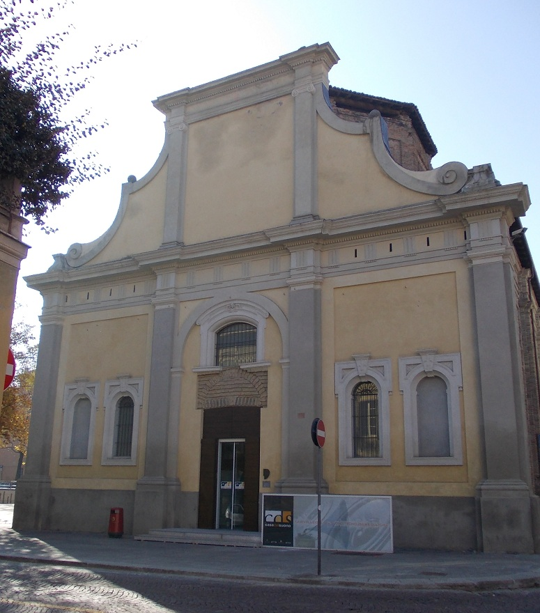 La facciata dell'ex chiesa di Sant'Elisabetta a Parma, già delle terziarie francescane, ora sede della Casa del Suono